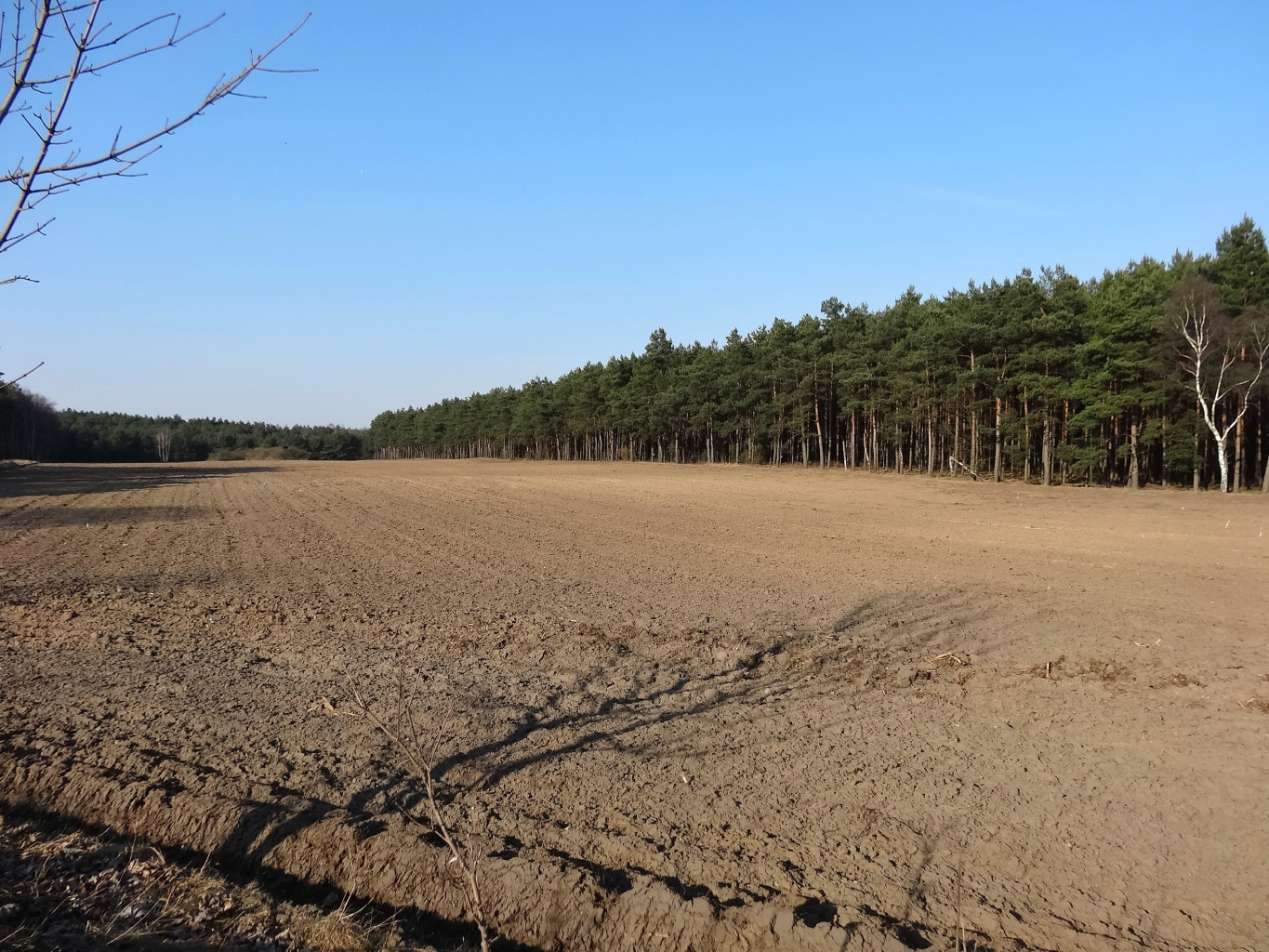 Pola w Wypaleniskach k. Bydgoszczy